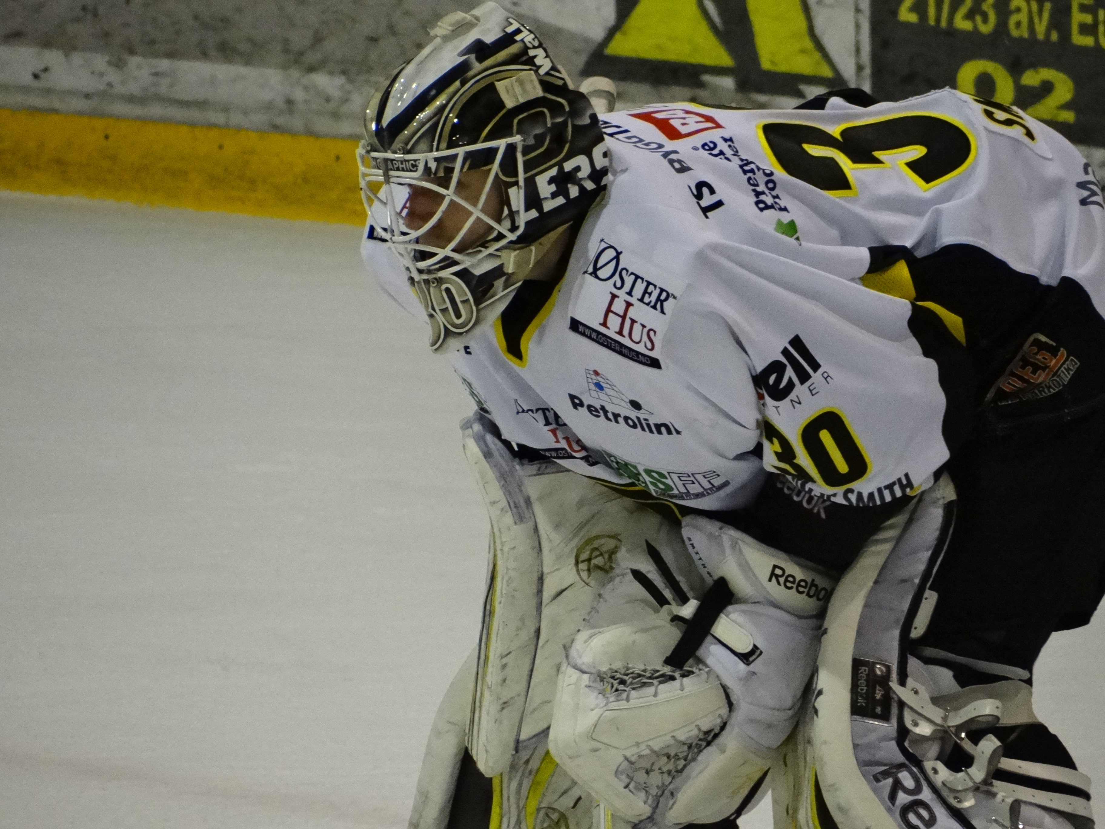 Coupe Continentale de hockey 2014 à Rouen - Ruben Smith